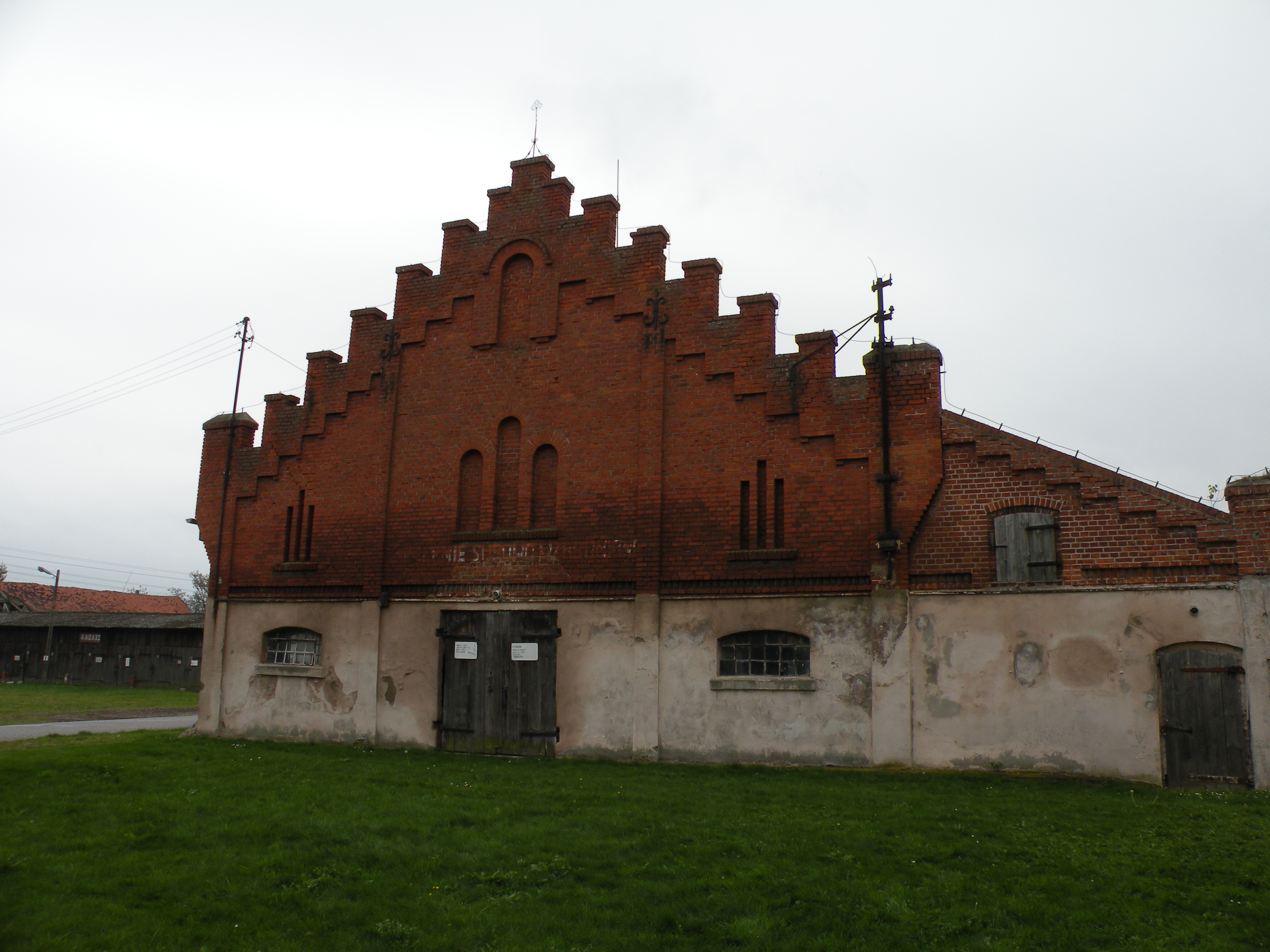 Łężany - zespół zabudowy folwarcznej XIX/XX w. (zabytek nr A-4304 i A-2681 z 29.06.2004)